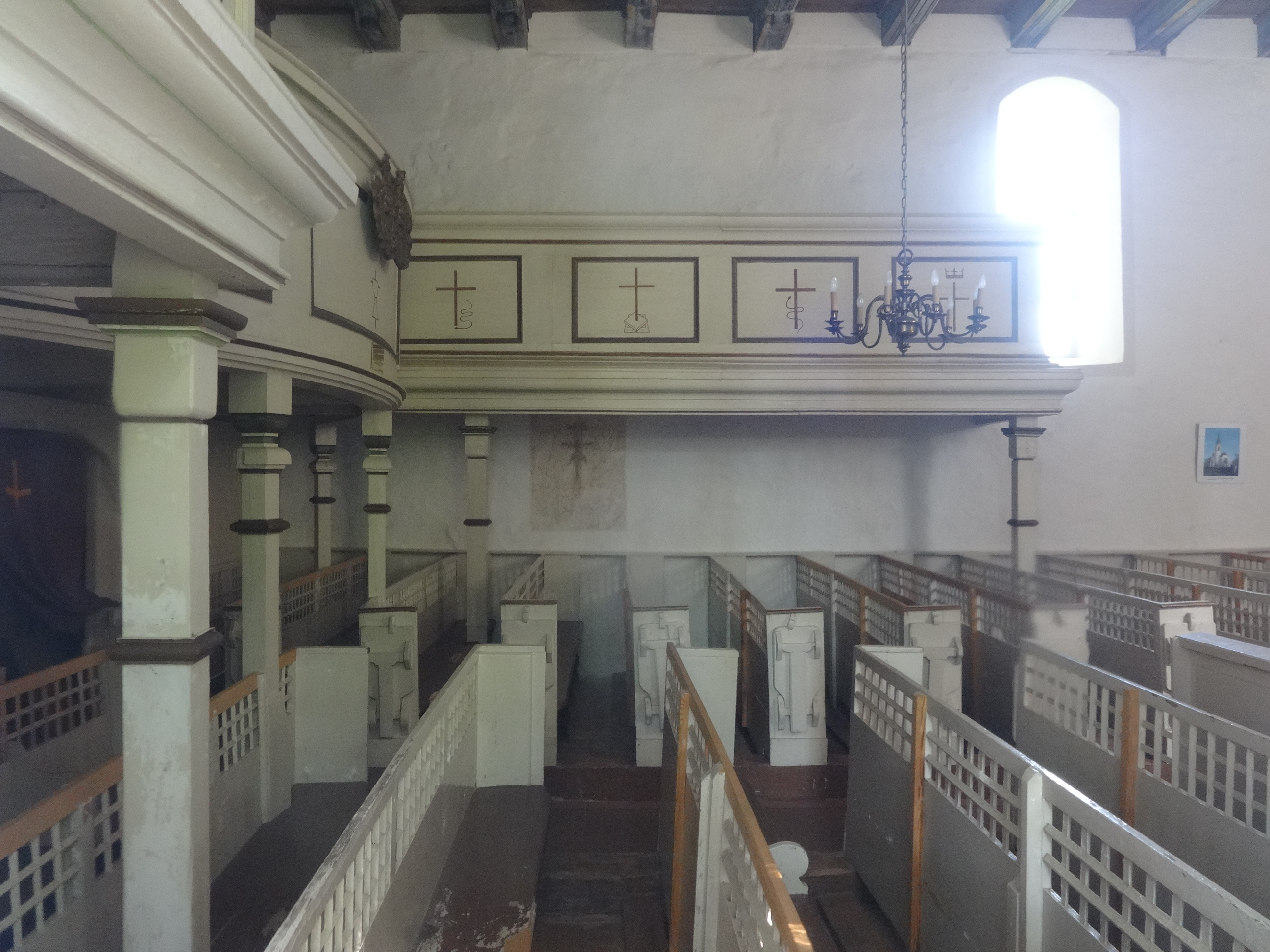 Die Dorfkirche in Zieckau wurde vermutlich im 14. Jahrhundert aus Feldsteinen errichtet. In seinem Innern befindet sich ein Kanzelaltar aus dem Jahr 1727, der ursprünglich in der Hospitalkapelle in Luckau stand.